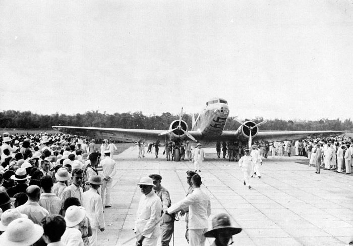 Repronegatief. Aankomst van de 'Uiver' na de Londen-Melbourne-race op het Darmo-vliegveld te Surabaya, Java